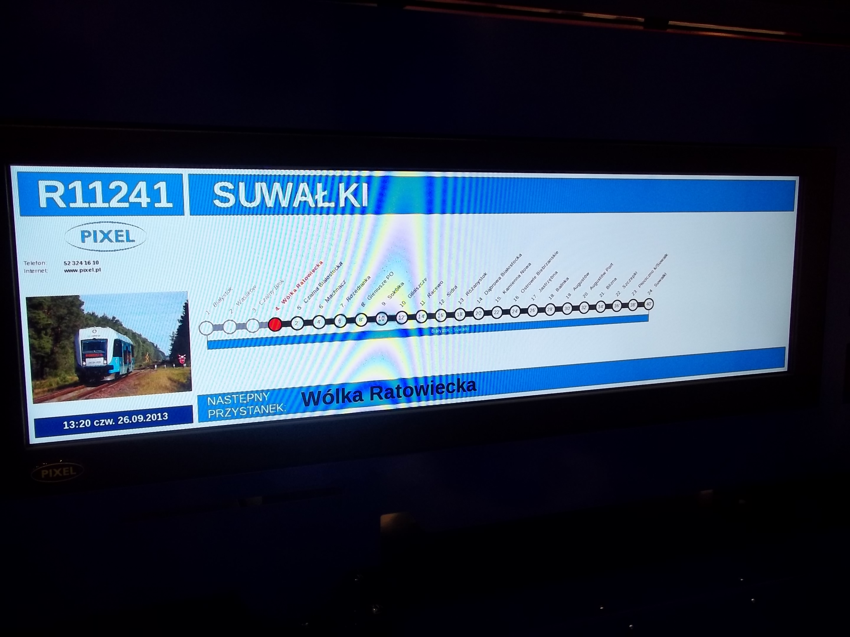 Monitor informacyjny systemu informacji pasażerskiej firmy Pixel.